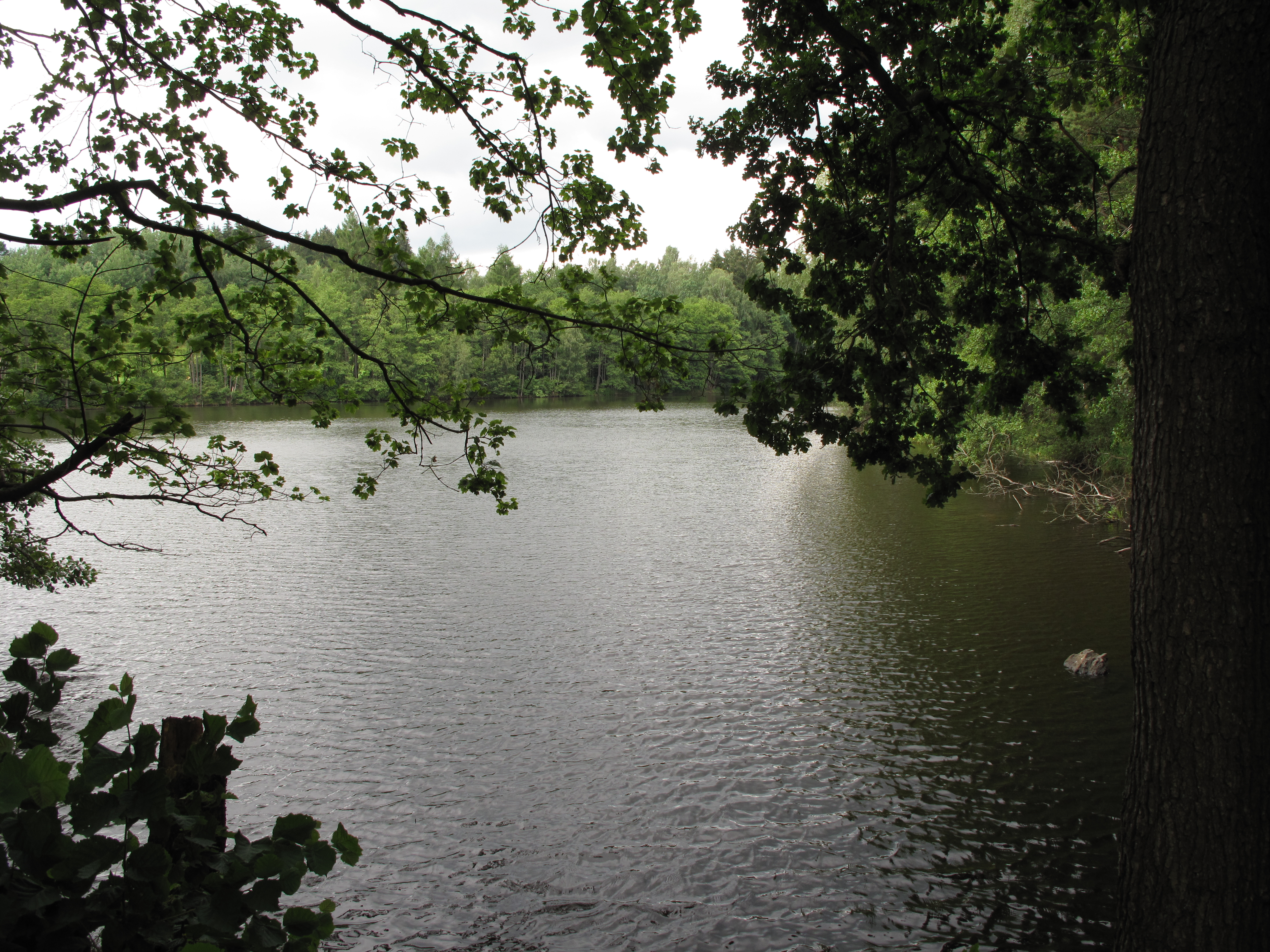 Přírodní rezervace Rybník Starý. Okres Pelhřimov, Česká republika.